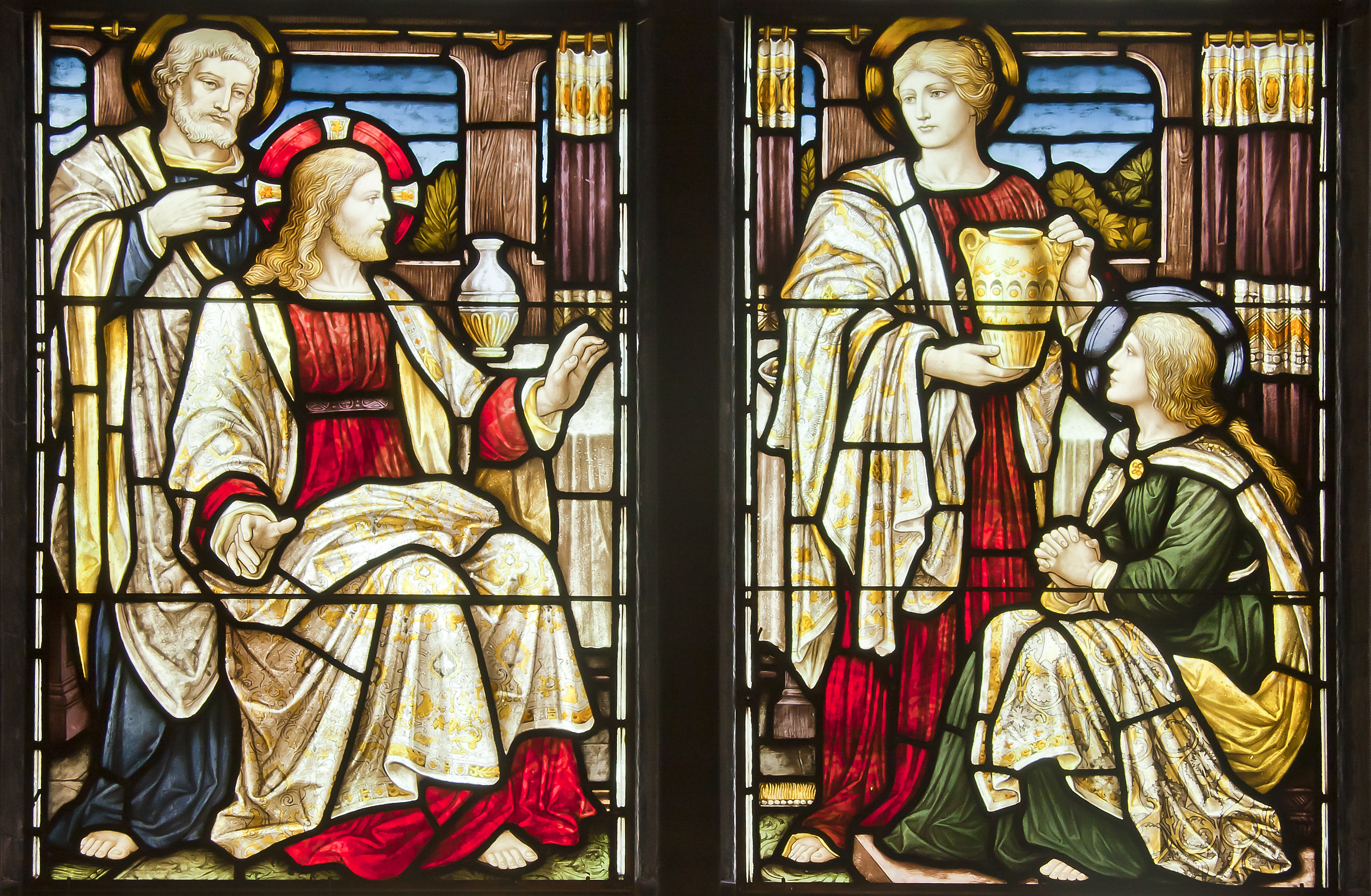 Kyrkfönster från 1800-talet i Nikolai kyrka i Örebro efter kartong av Carl Almquist. Motivet föreställer Jesus hos Marta och Maria.